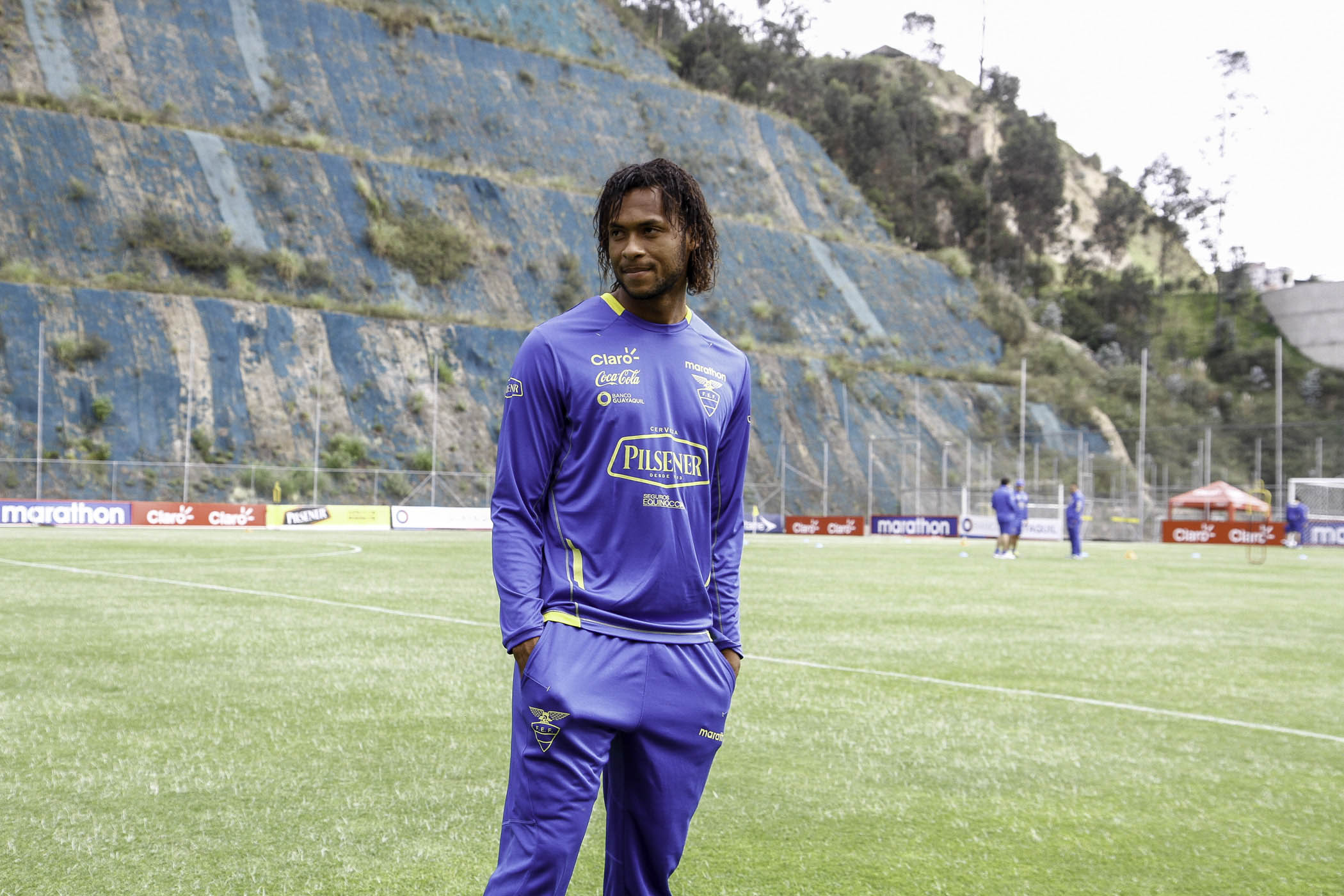 Quito, 27 de mayo (Andes).- En la Casa de la Selección se concentró la Tricolor para el respectivo entrenamiento previo a su participación en la Copa América a realizarse en Chile el próximo 11 de junio. ANDES/Micaela Ayala V.